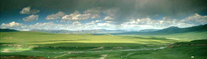 Typische Steppenlandschaft im Yarmothang, dem östlichen Ausläufer des Changthang (Inner-Tibet) Foto: Andreas Gruschke (Freiburg)